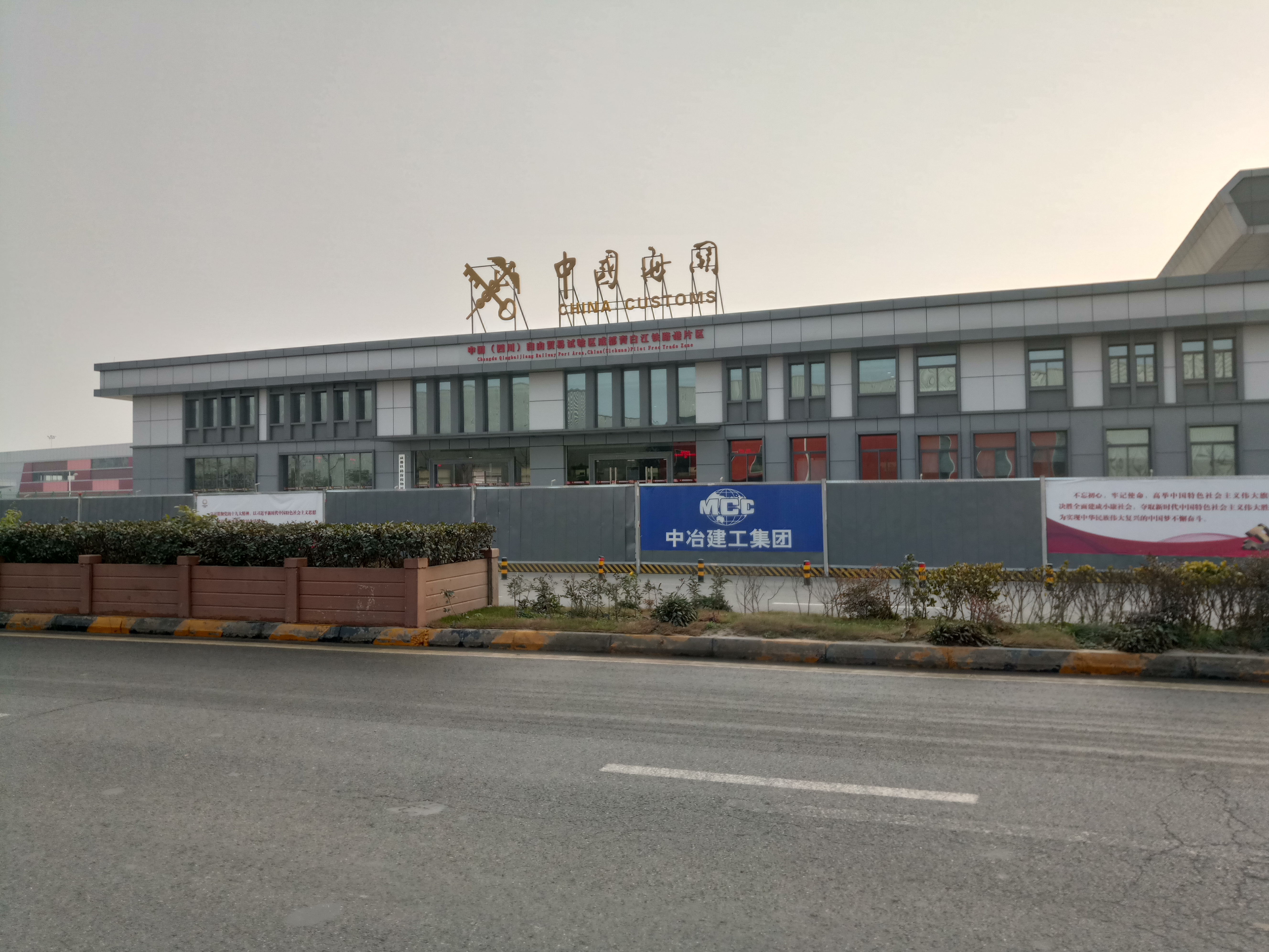 中文（中国大陆）: 成都铁路港中国海关大楼